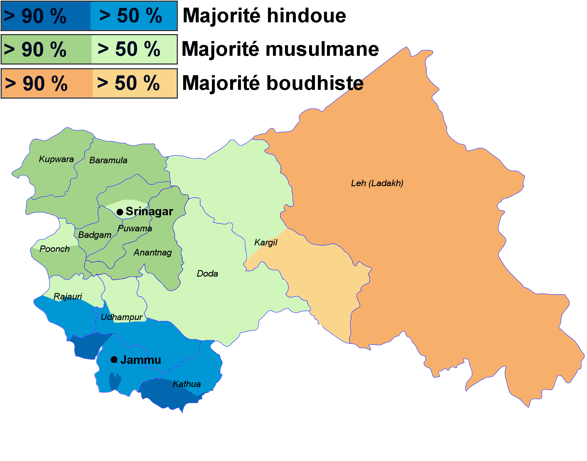 carte des religions au Jammu et Cahemire